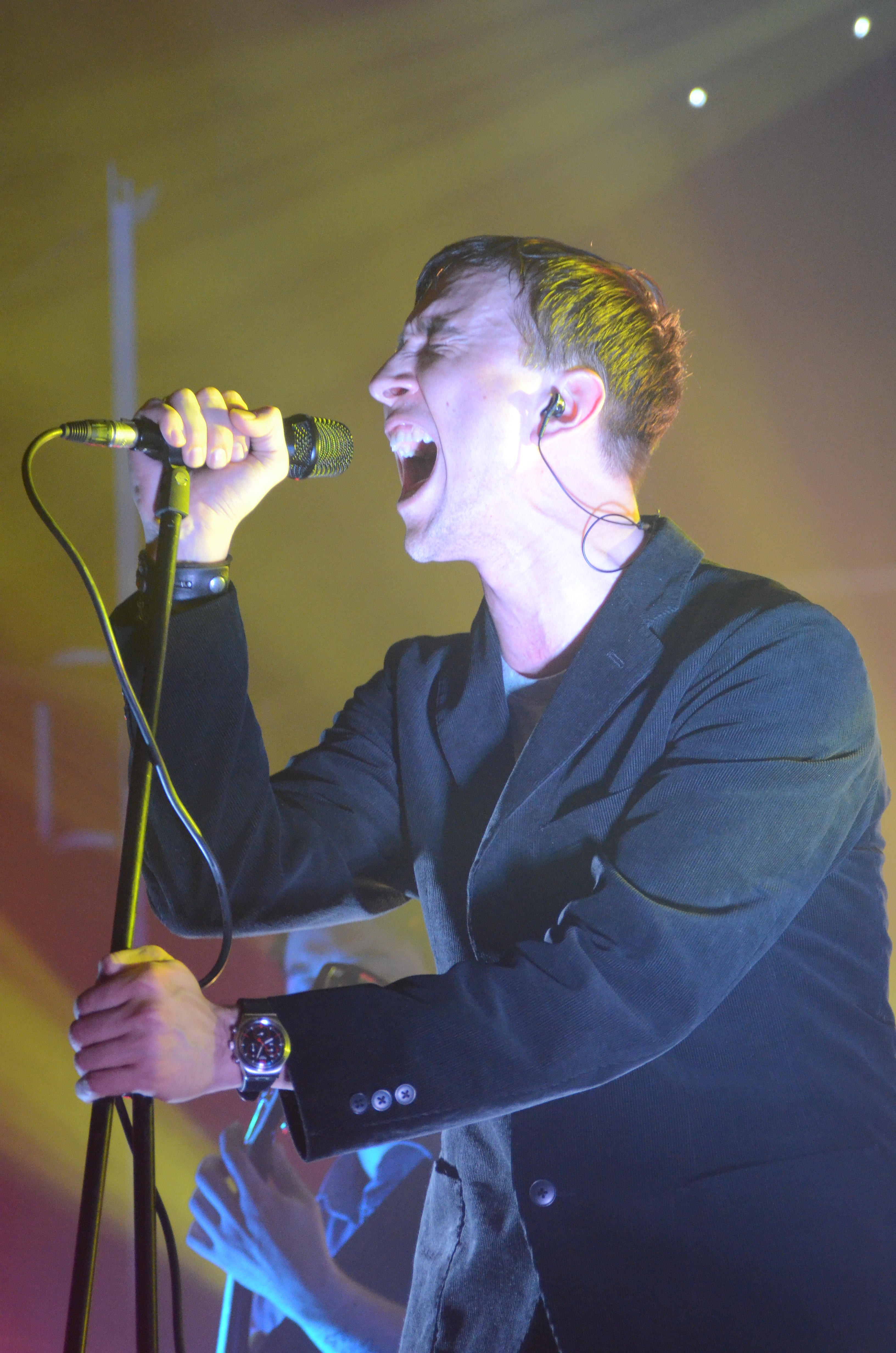 Концерт группы Lumen в Донецке